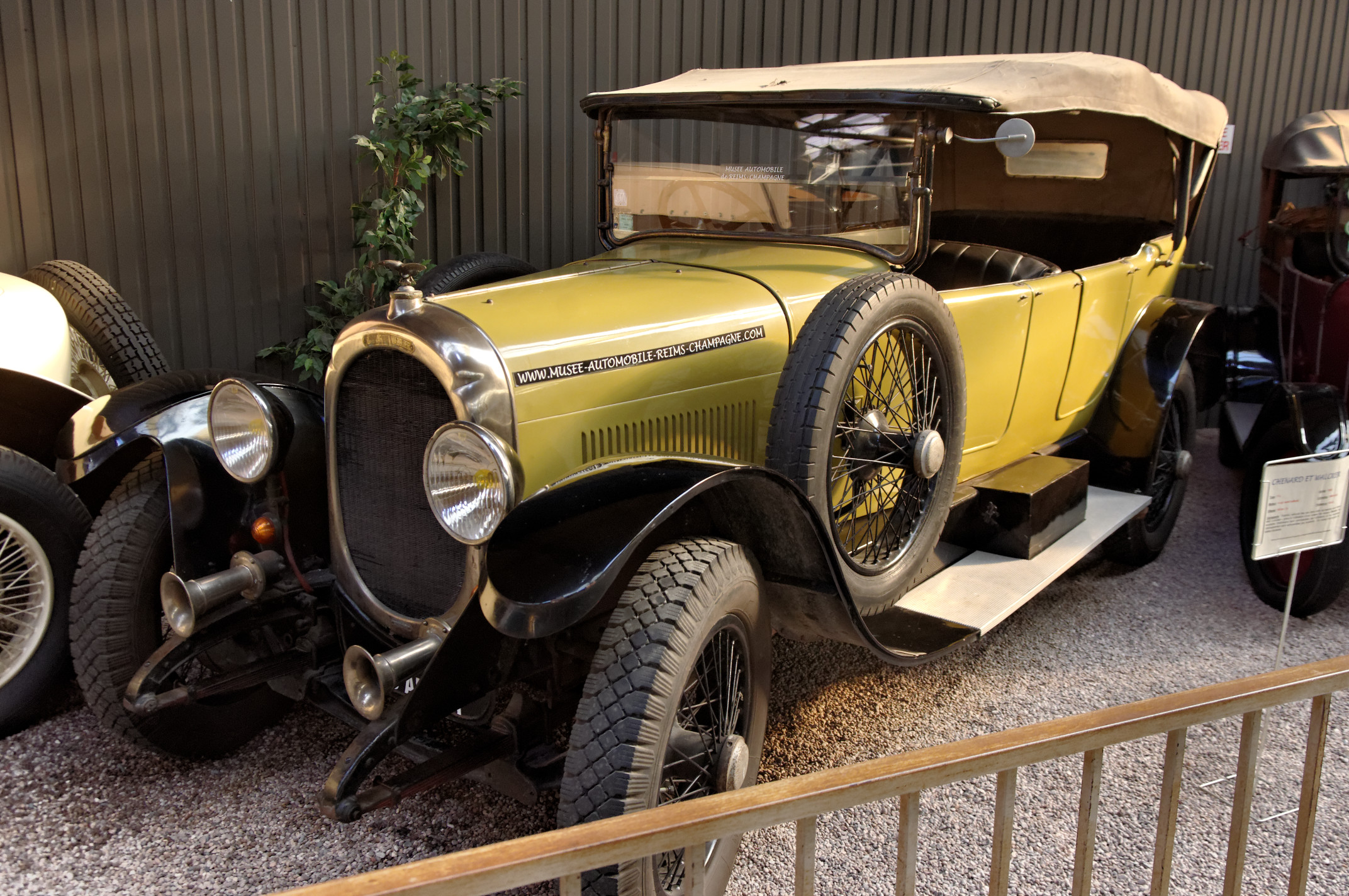 Chenard et Walcker T4 (1925), Torpédo, 4 cyl., semi-culbuté, 1900 cm3, 40 ch., vitesse max. 90 km/h (Musée Automobile Reims Champagne, Reims, Marne, France)